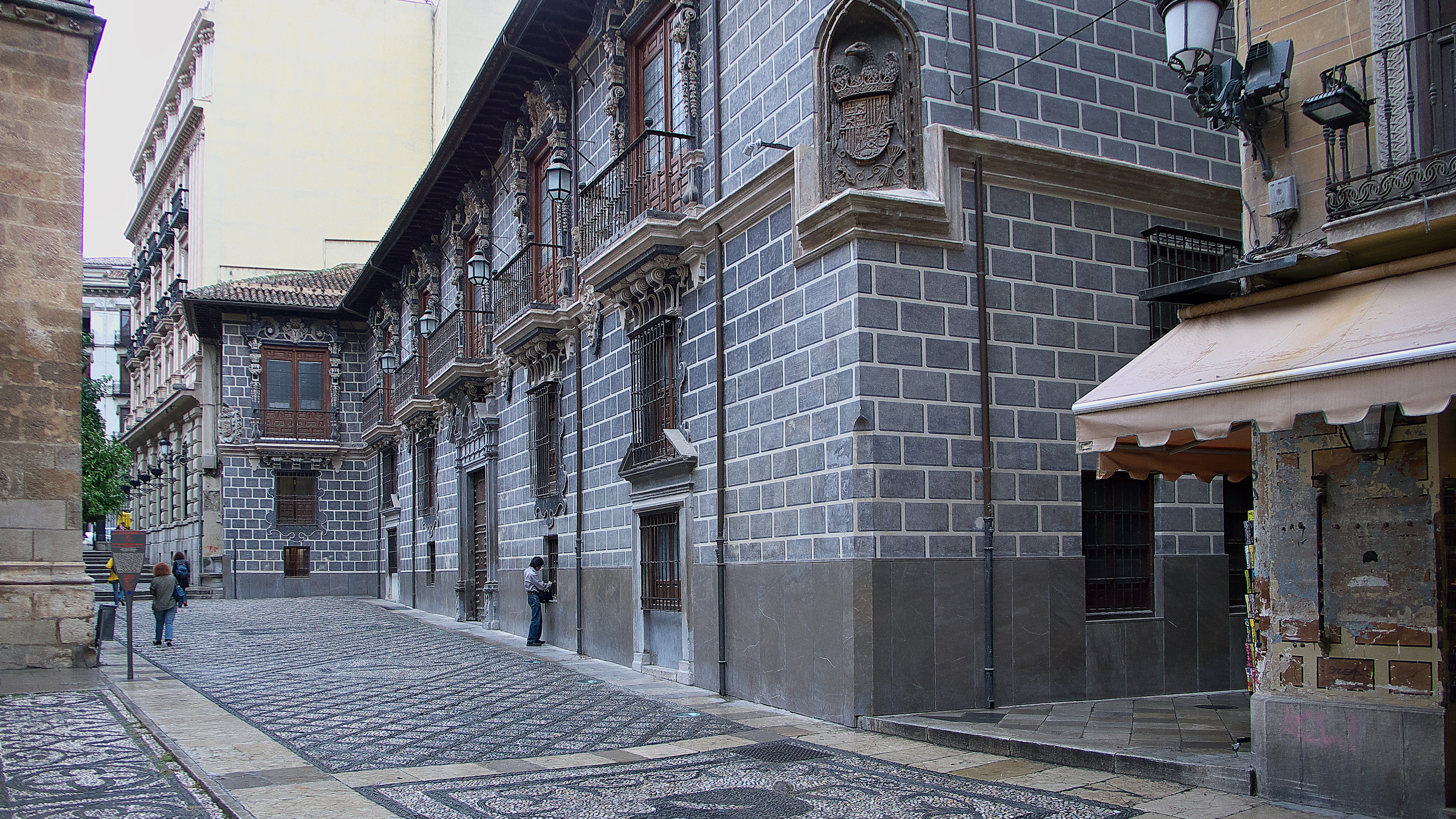 Fachada actual de la Madrasa de Yûsuf I (1333-1354). José de Bada proyecta un nuevo edificio (1722-1729), conservándose el oratorio y el mihrâb.